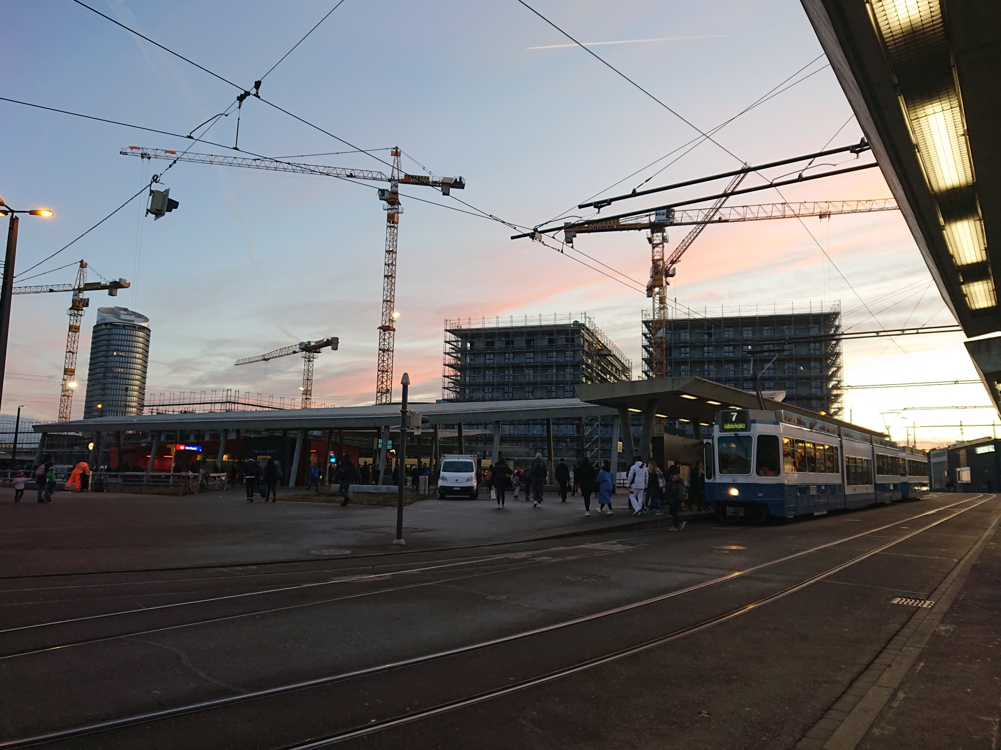 Bahnhof Stettbach, Sicht auf Jabee und Baustellen in Dübendorf